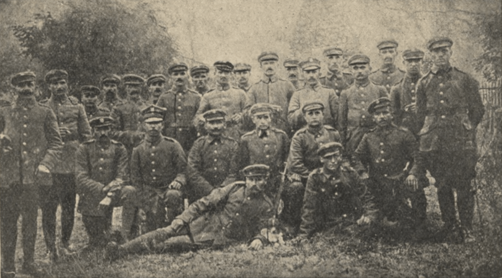 I powstanie śląskie, kompania powstańców w Bobrku Jan Trzęsiok.